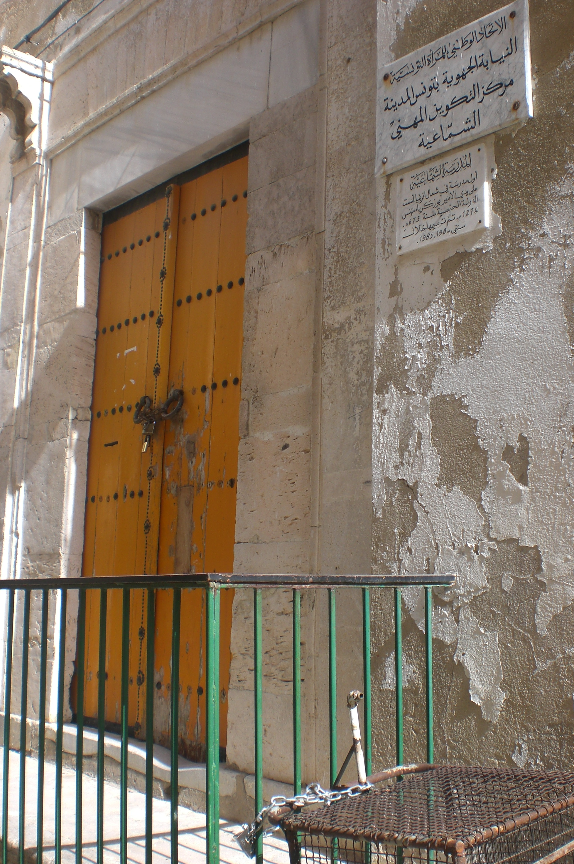 Medersa Chamaiya-Tunis